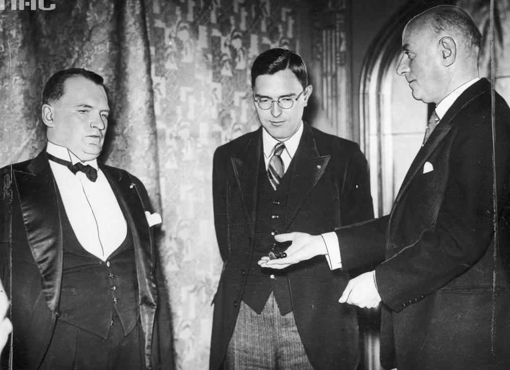 Losowanie figur szachowych. Szachowe Mistrzostwa Świata w Hadze. Stoją od lewej: Aleksander Alechin, Max Euwe i prezes komitetu turnieju Max Levenbach.